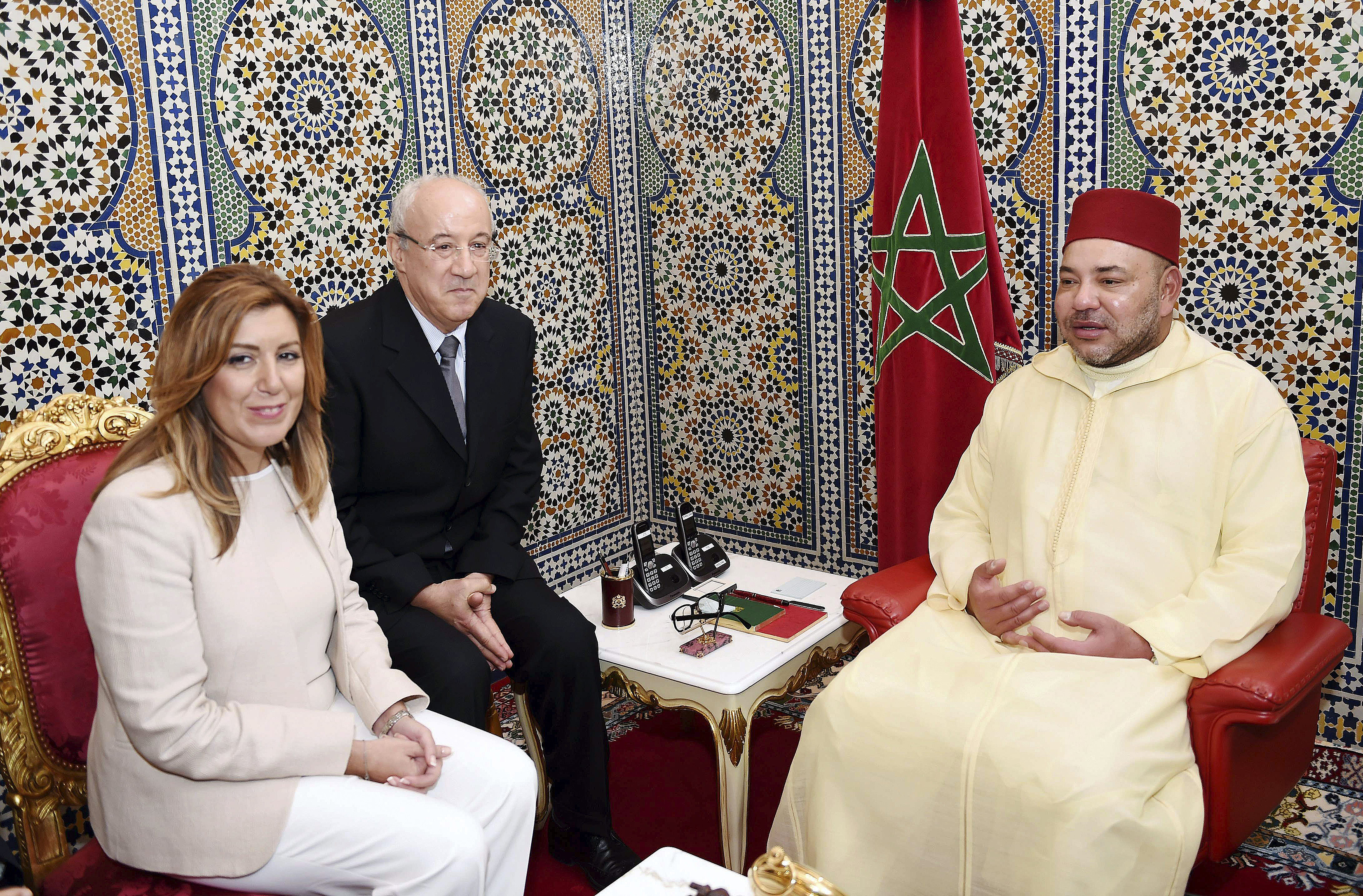 GRA356. Rabat, 12/09/14.- Fotografía cedida por la MAP de la audiencia concedida hoy por el Rey de Marruecos, Mohamed VI, a la presidenta de la Junta de Andalucía, Susana Díaz, que se encuentra en visita oficial en el país. Esta reunión no estaba prevista en la agenda oficial del viaje de Díaz. EFE/MAP/SOLO USO EDITORIAL/NO VENTAS